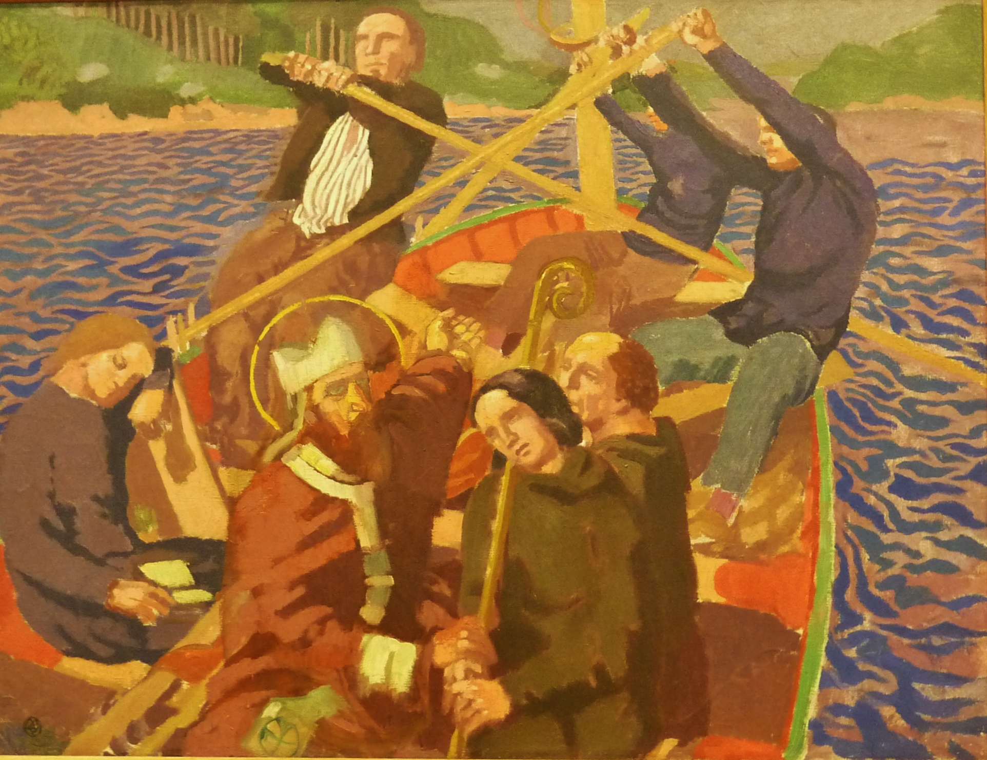 Maurice Denis : Barque au saint breton ou Portait d'Albert Clouard en saint (huile sur toile, entre 1903 et 1906, musée des beaux-arts de Morlaix)